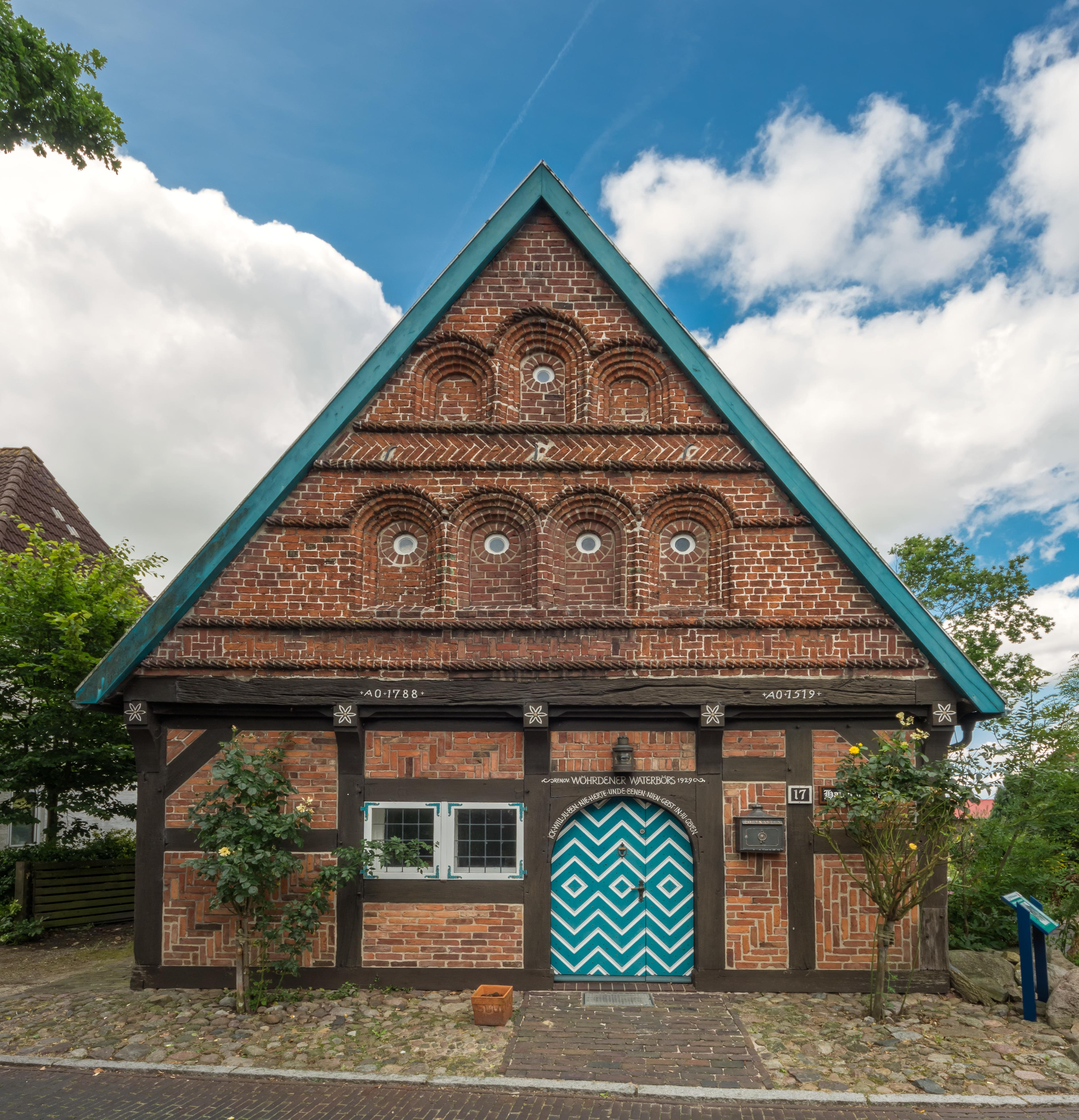 Bilder aus Wöhrden Historisches Gebäude am Kirchplatz